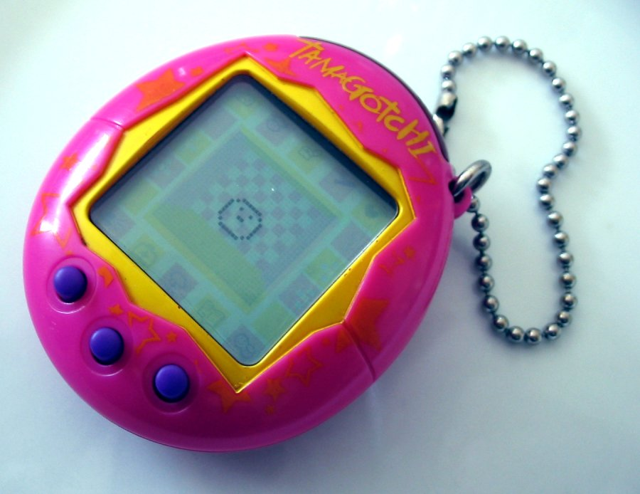 概要：絵画のたまごっち 出典：英語ウィキペディア.